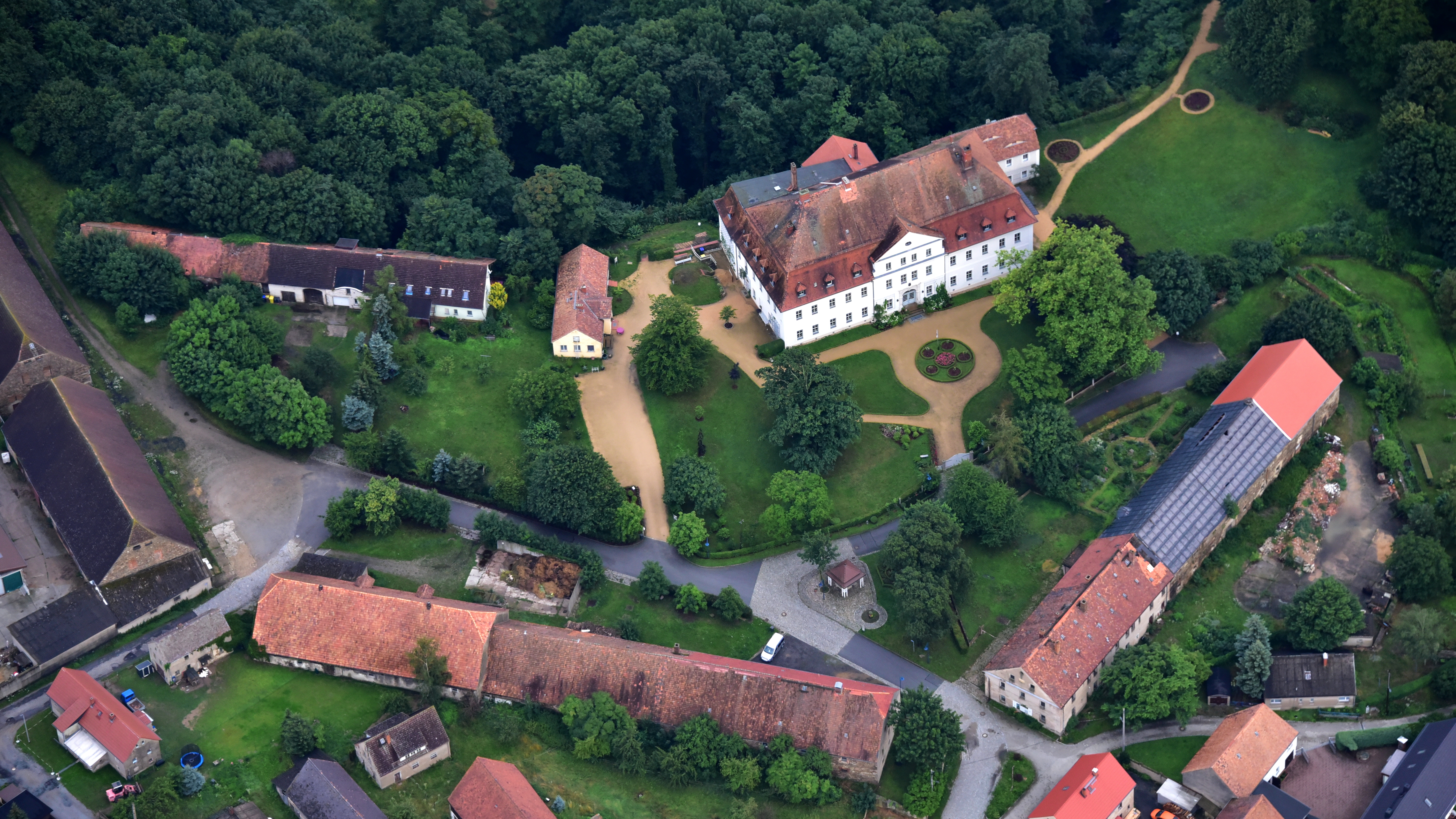 Schloss Gröditz (Weißenberg), Luftaufnahme (2017) Hornjoserbsce: Powětrowy wobraz Hrodźišćanskeho hrodu (2017)